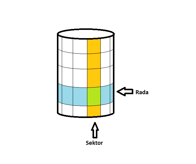 Trummelmälu silindri rajad ja sektorid